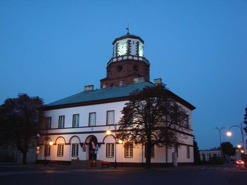 Brama Krakowsk i Ratusz